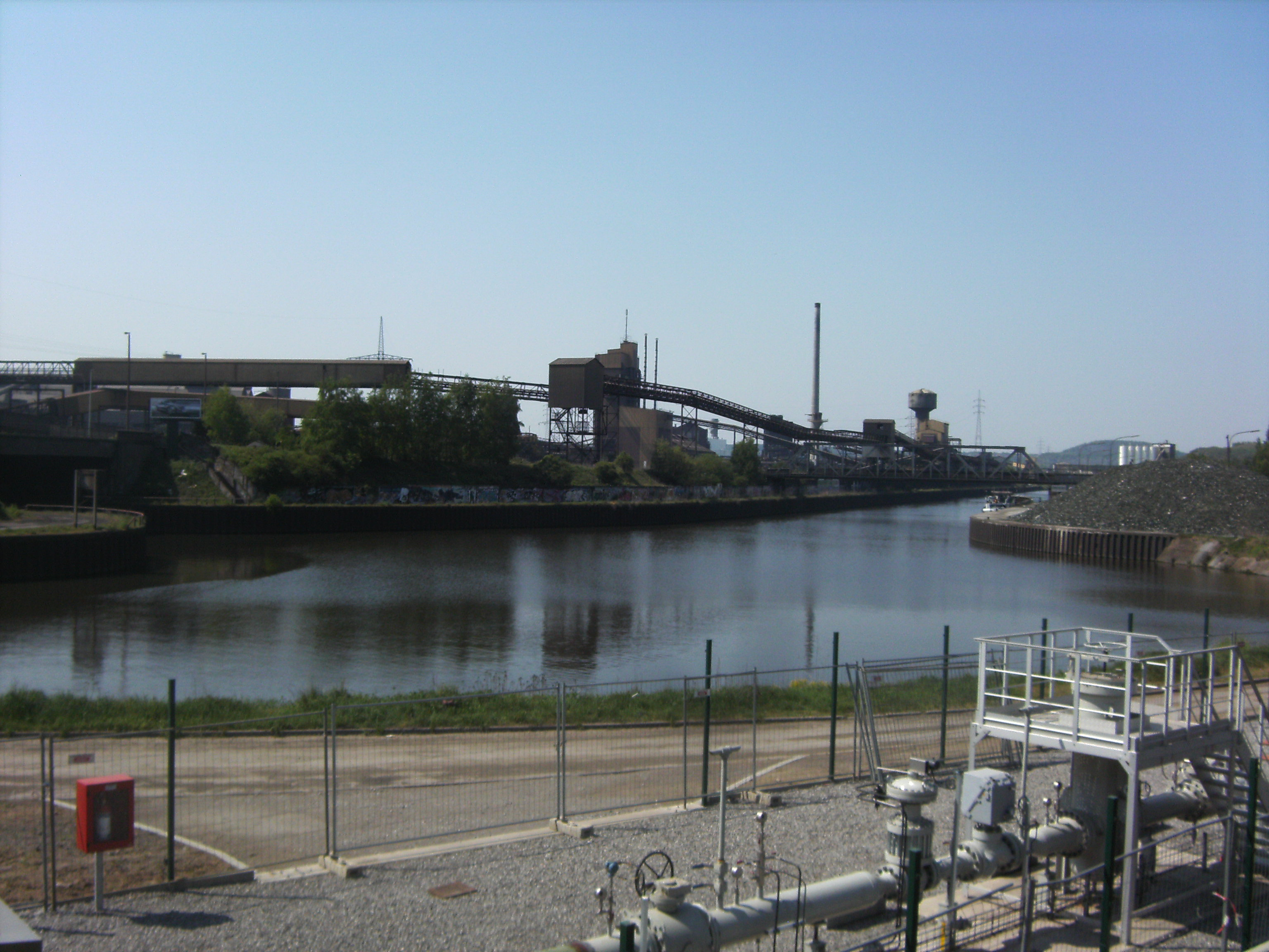 Charleroi (Belgique) - Canal Bruxelles-Charleroi : arrivée du canal à Dampremy.